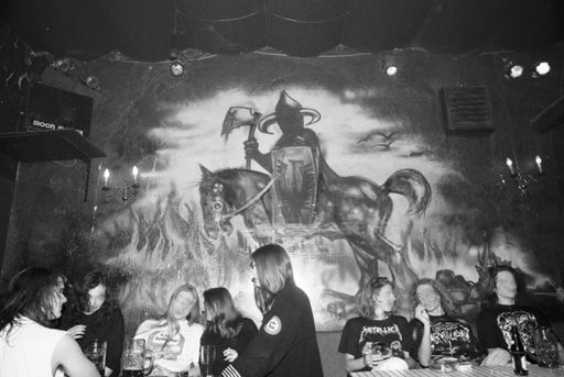 Heavy Metaller in der Disco Fantasy (1981-2001) in München-Neuaubing